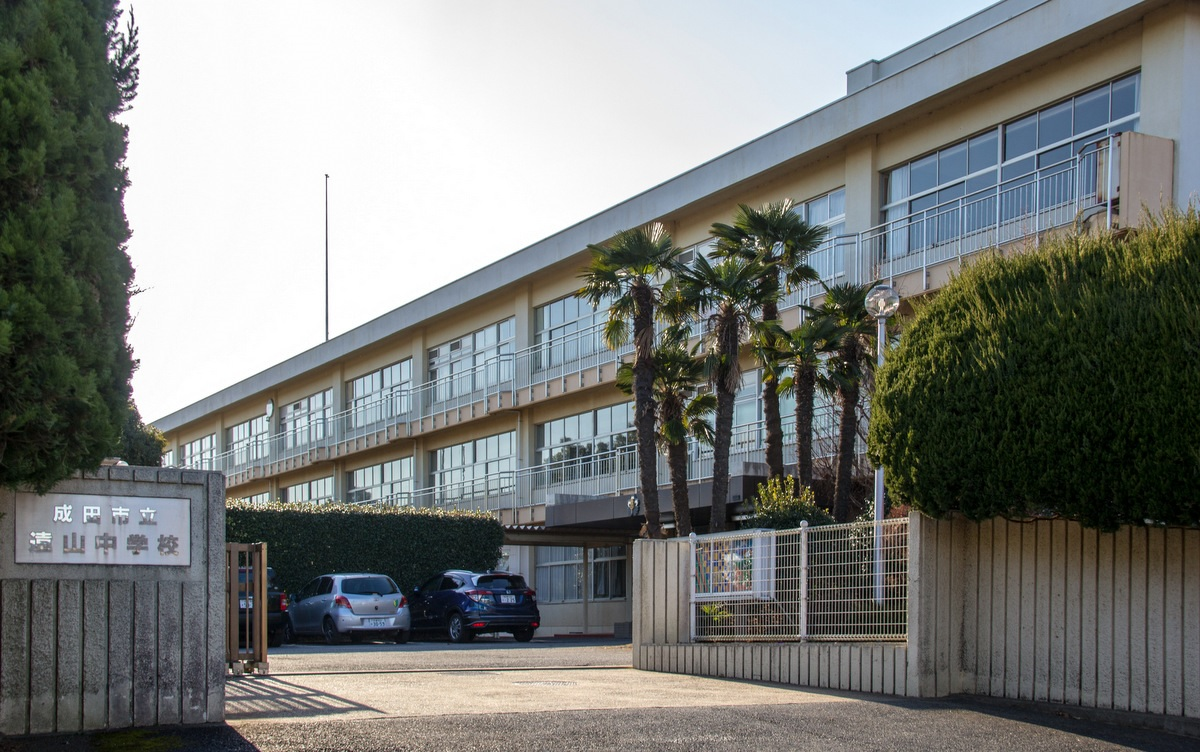 成田市立遠山中学校